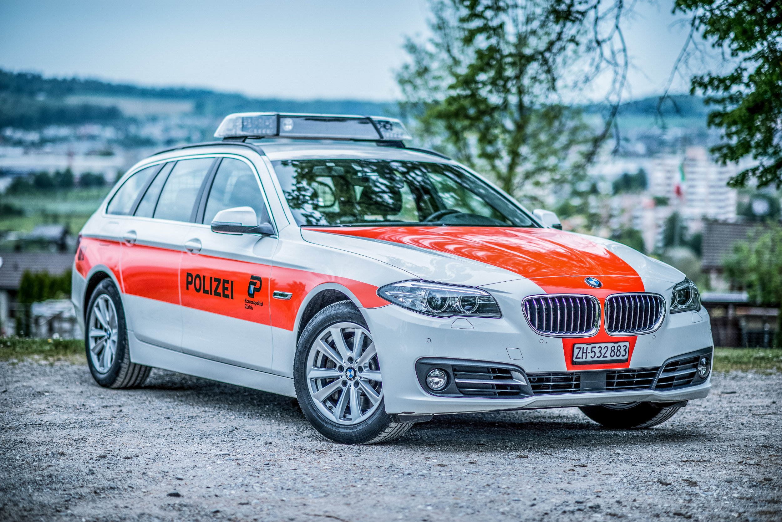 Patrouillenfahrzeug der Kantonspolizei Zürich, Verkehrspolizei, BMW 530d